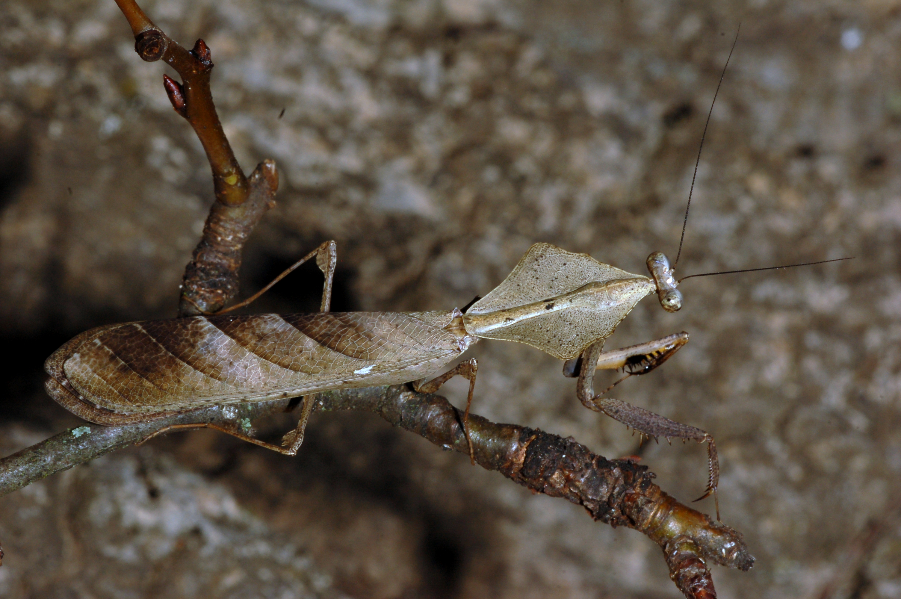 Männliches Totes Blatt Deroplatys lobata (Mantidae) in Gefangenschaft, Museum Wiesbaden, Deutschland